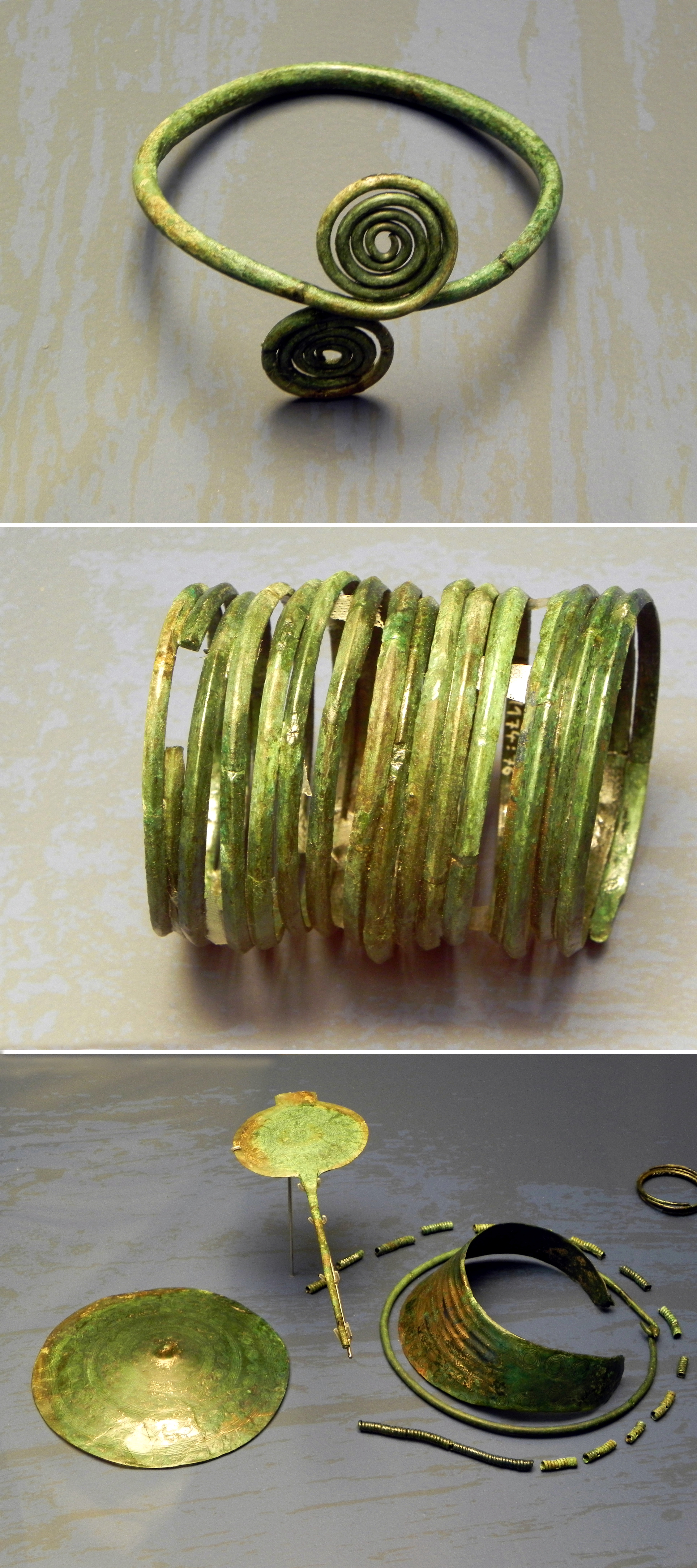 Trachtbestandteile aus dem Hügelgrab Hengstberg, nahe Wardböhmen (Stadt Bergen) V-Haubenschmuck, Halskragen, Schmuckscheibe, Nadel, Arm- und Beinringe von 1.500 - 1.200 v. Chr.